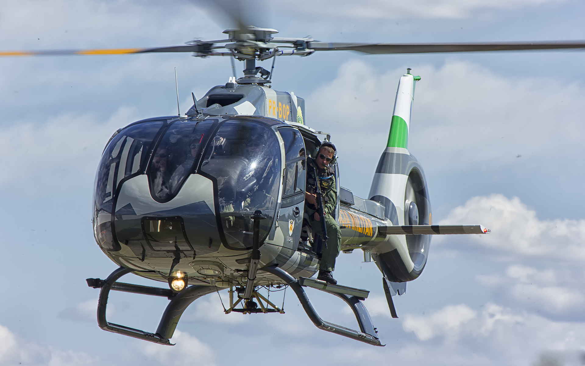 Falcão 04 BPMOA - EC130B4 (PR-BOP)